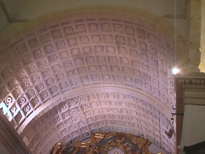 Volta del presbiterio della chiesa di Sant'Agostino (XVI secolo) a Cagliari